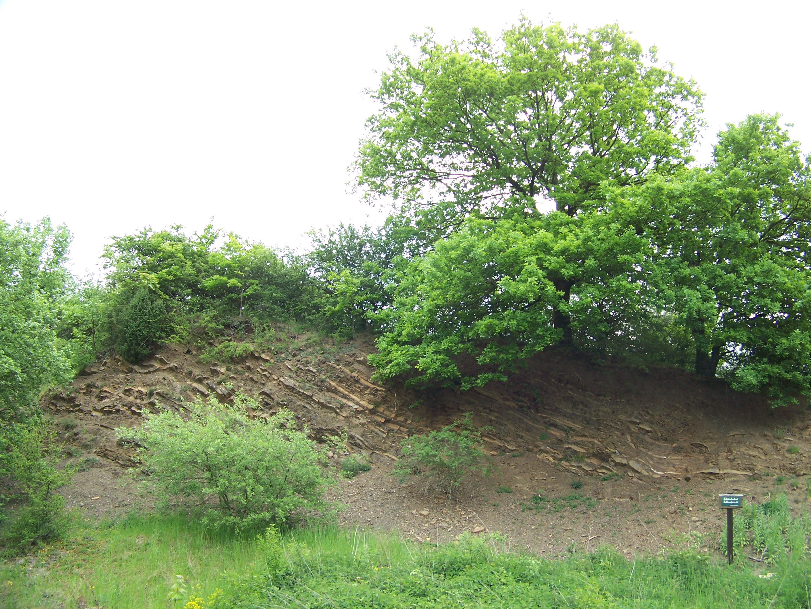 Kalksteinbruch am Fuße des Wollenspeiert, Dautphetal-Buchenau